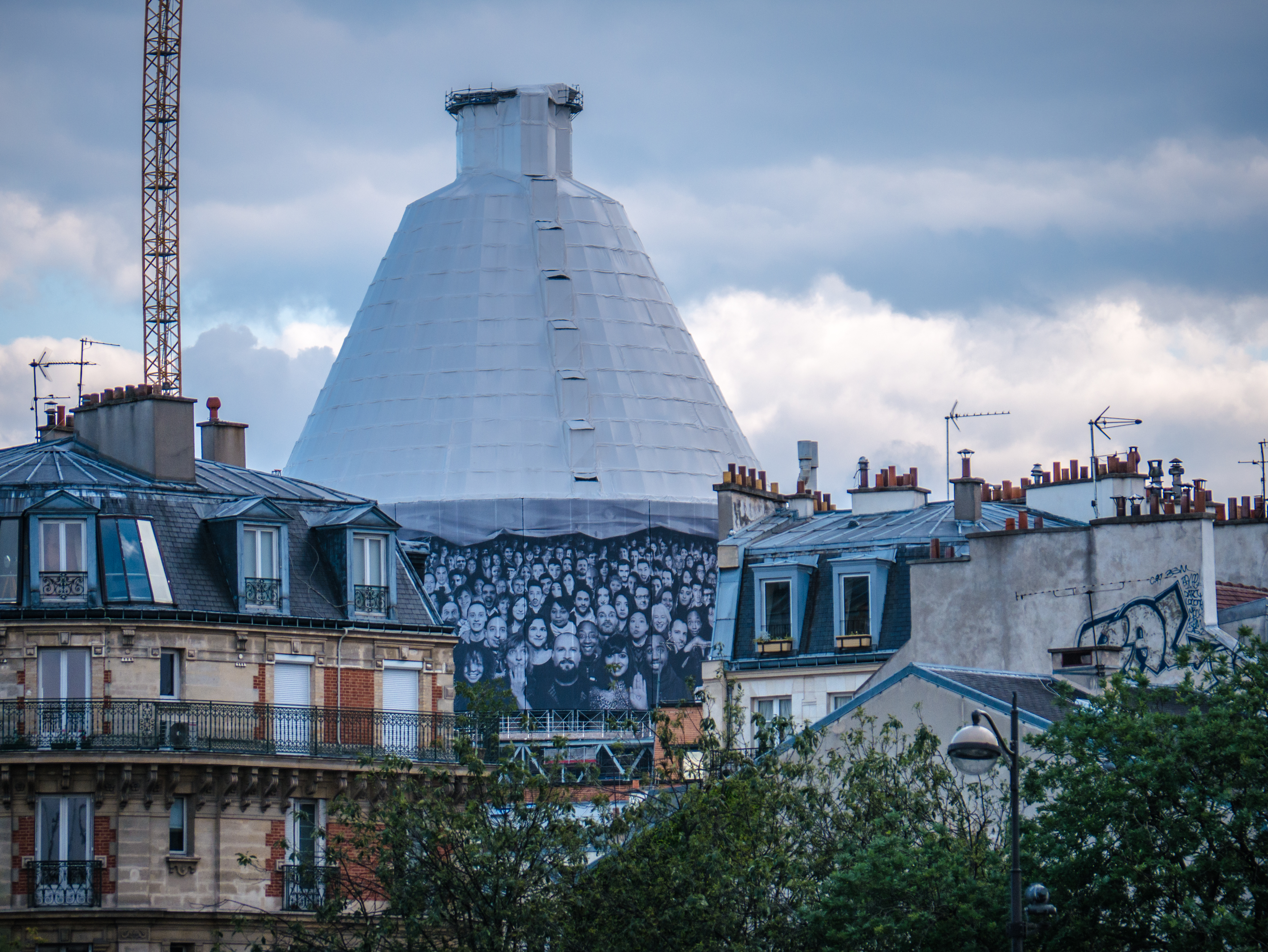 L'installation Au Panthéon de JR vue du Parvis Notre-Dame, Paris.